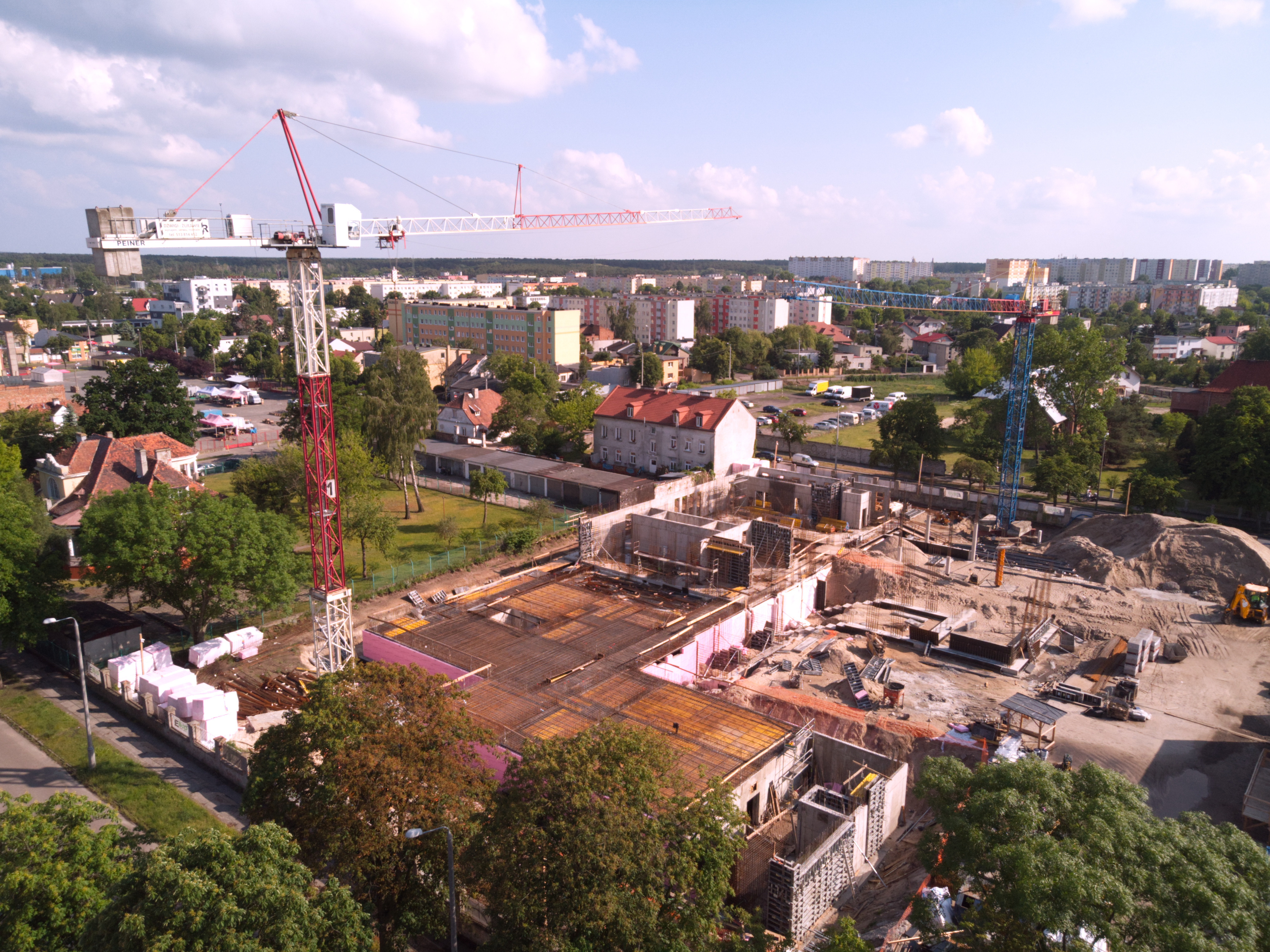 Budowa sądu okręgowego (2020 r.)